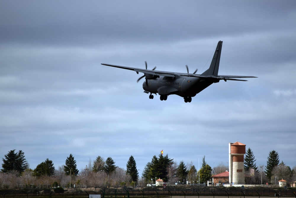 Avión de transporte del ejército del aire en final al aeropuerto de Valladolid